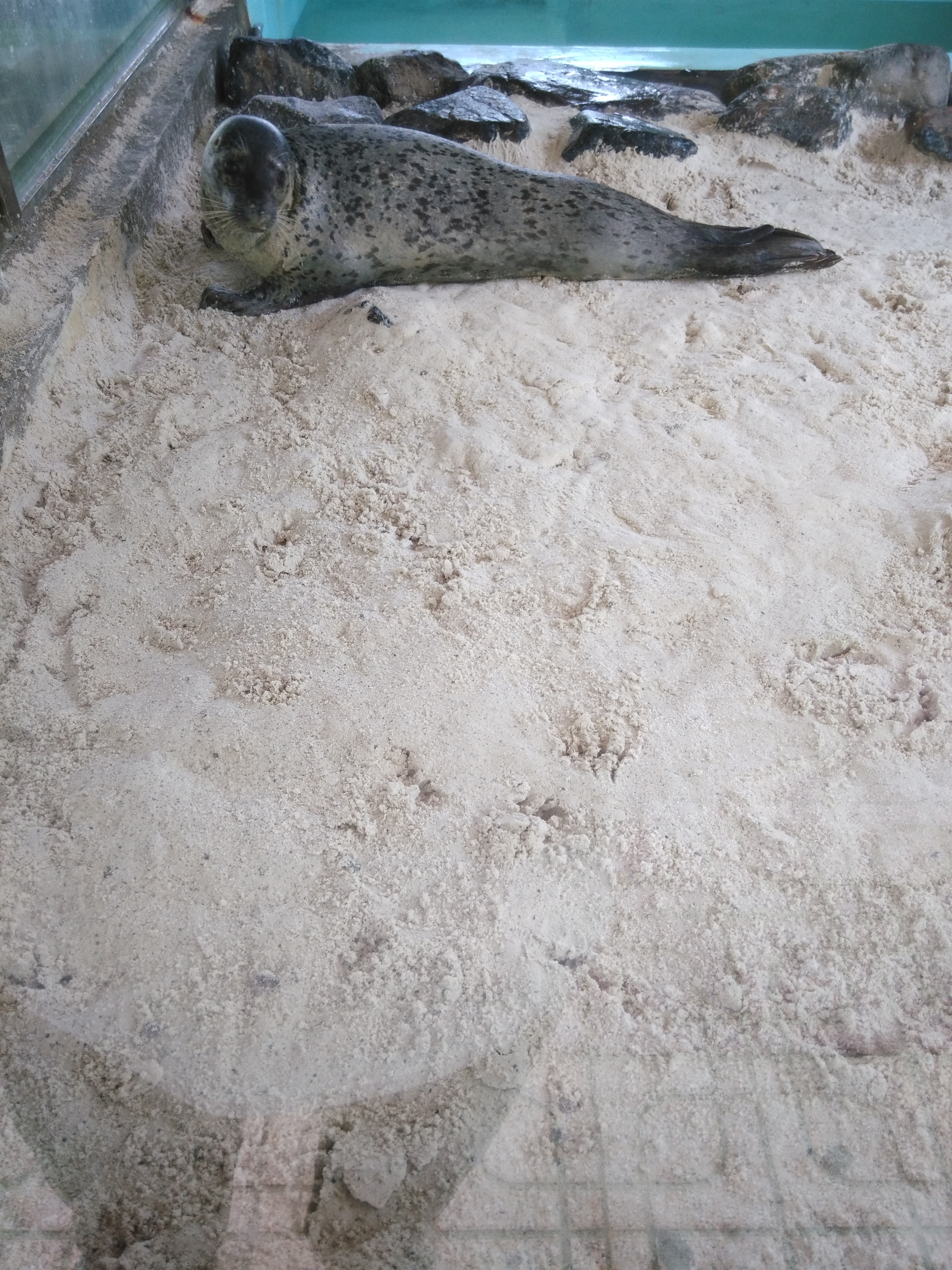 Hình tự chụp bằng máy điện thoại di động cá nhân về một con hai cẩu đốm Việt Nam tại Viện Hải dương học Nha Trang